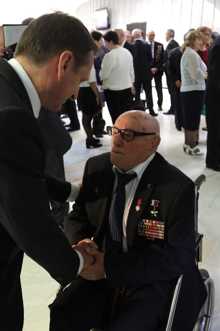 Директор Службы внешней разведки Сергей Нарышкин и советский разведчик, Герой России Алексей Ботян в штаб-квартире СВР на торжественном мероприятии по случаю 95-летия российской нелегальной разведки.